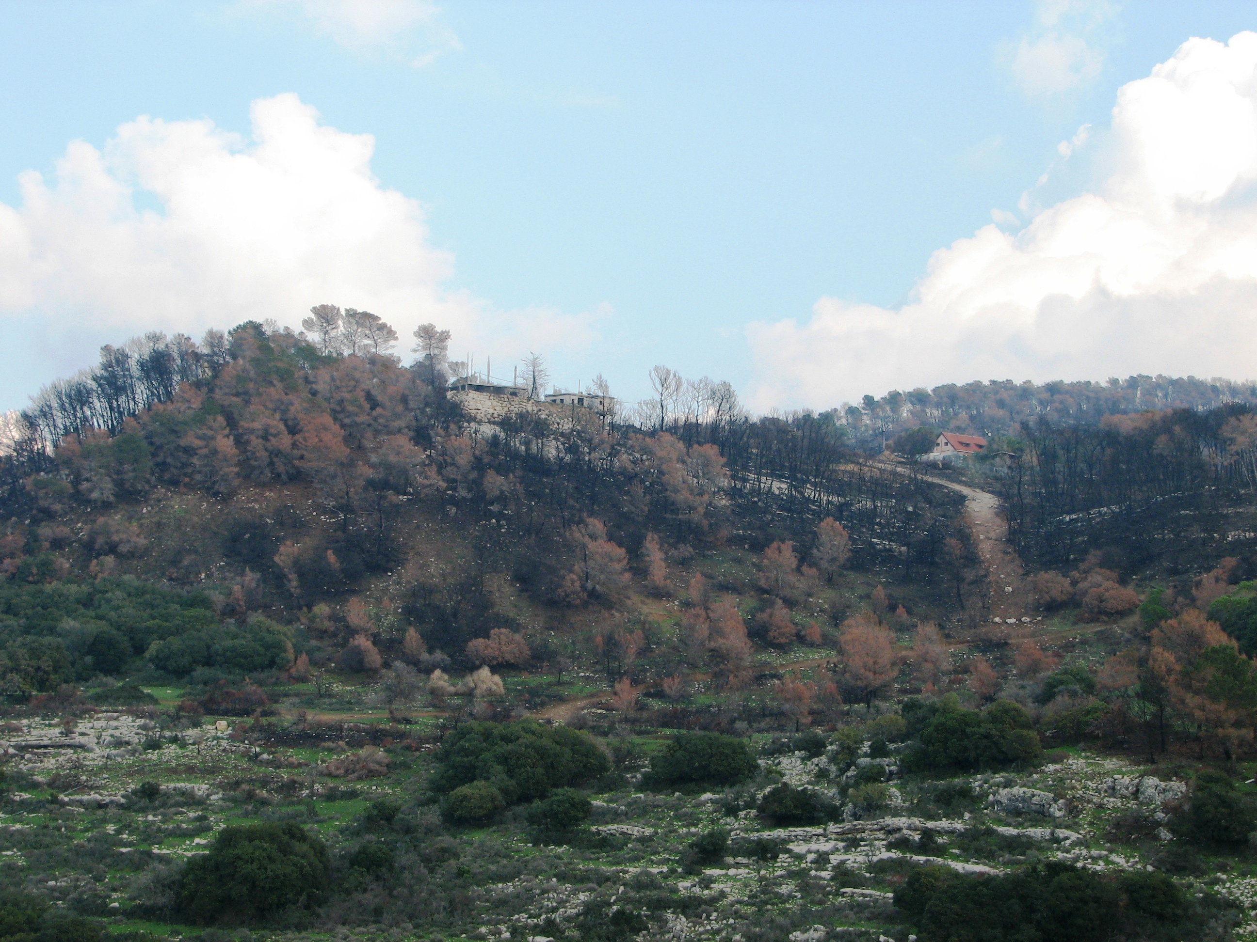 Givat Wolfson on Mount Carmel גבעת וולפסון היא קבוצת של חמישה בתים פרטיים בכרמל, בצדו המערבי של הר ערקן, בהמשך הדרך העולה מ "חניון האגם" שבנחל אורן בסמוך לכביש 721. מבט על שלושה בתים בגבעת וולפסון מהכביש העולה למלון יערות הכרמל. מבט לכוון צפון מזרח